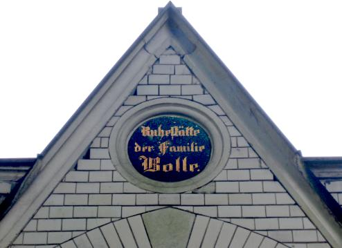 Giebel der Ruhestätte der Familie Bolle auf dem Sankt-Matthäus-Friedhof in Berlin-Schöneberg.